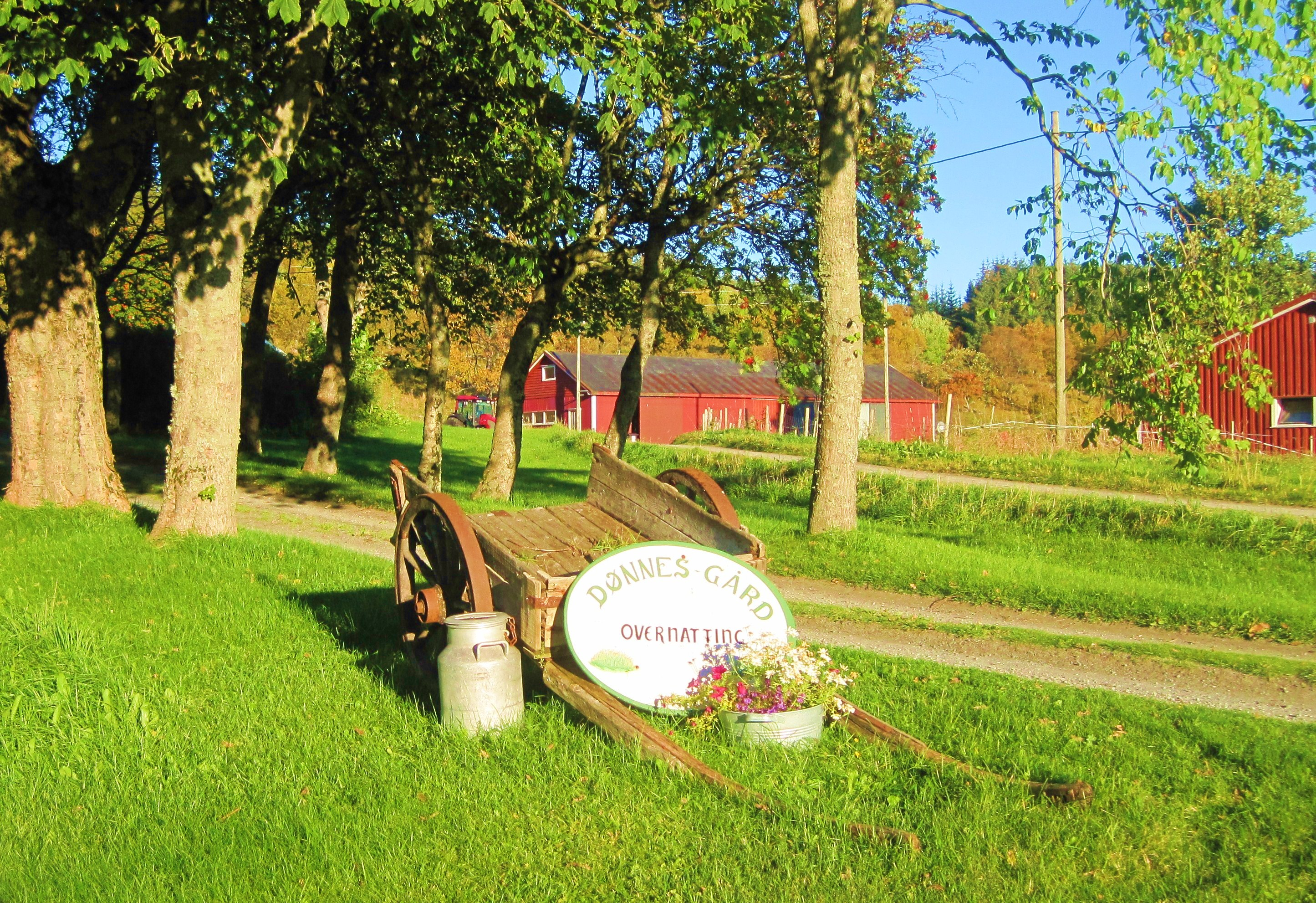 Gjestegården Dønnes Gård